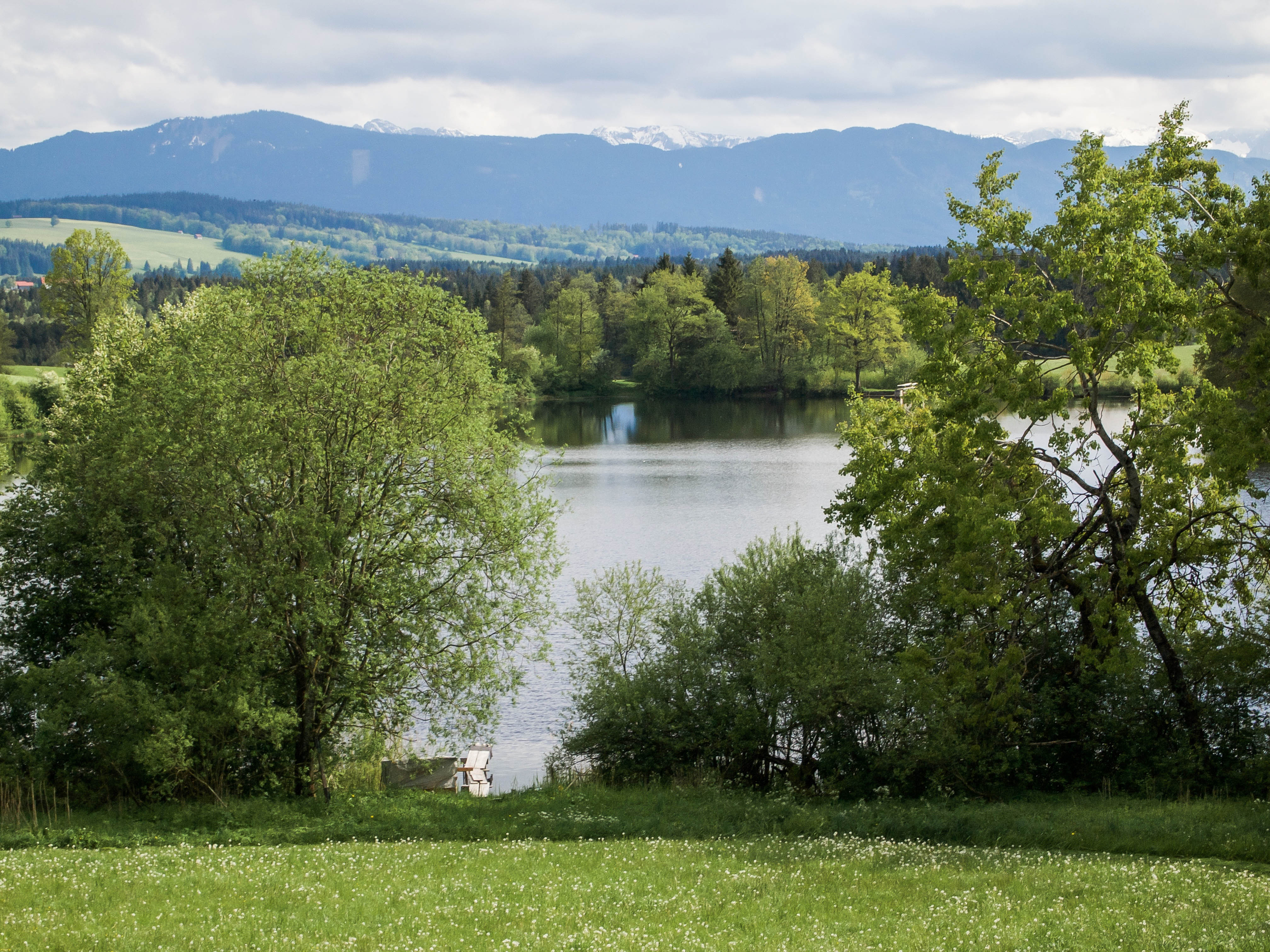 Blick von Norden auf den Gruber See zwischen Peiting und Steingaden, Oberbayern. (LSG:BY-LSG-00023.01)_LSG Langer Filz und Gruber See in den Gemeinden Peiting und Steingaden.